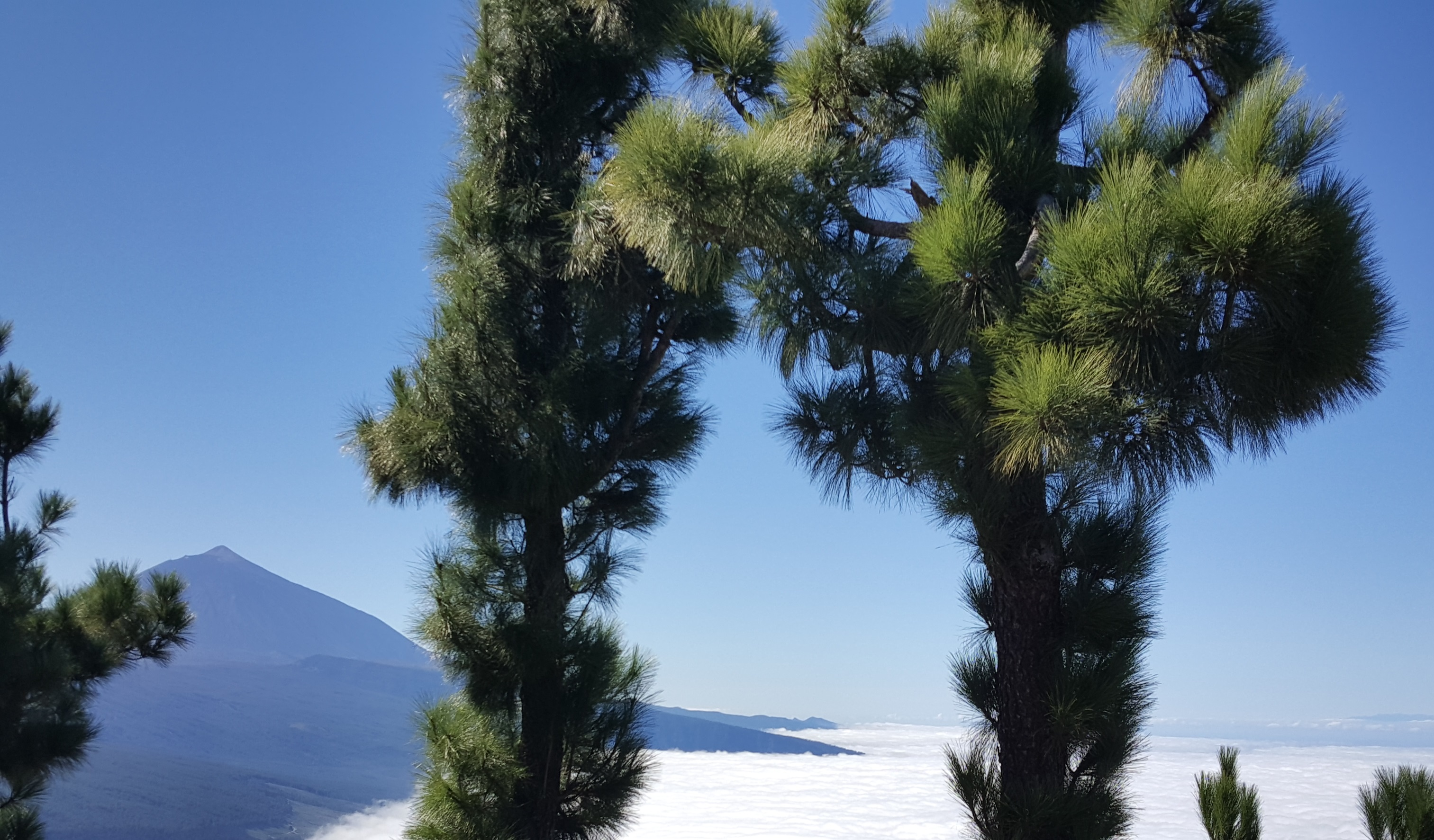 Teide in pines This is a photography of a Special Area of Conservation in Spain with the ID: ES7020043. Natura2000 entry, EEA entry